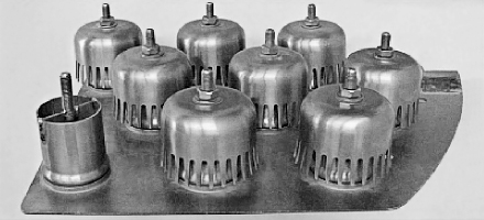 Glockenboden mit sichtbarem Glockenhals (vorne links) und darüber liegenden Glockenverdeckelungen für industrielle Rektifikationsanlagen